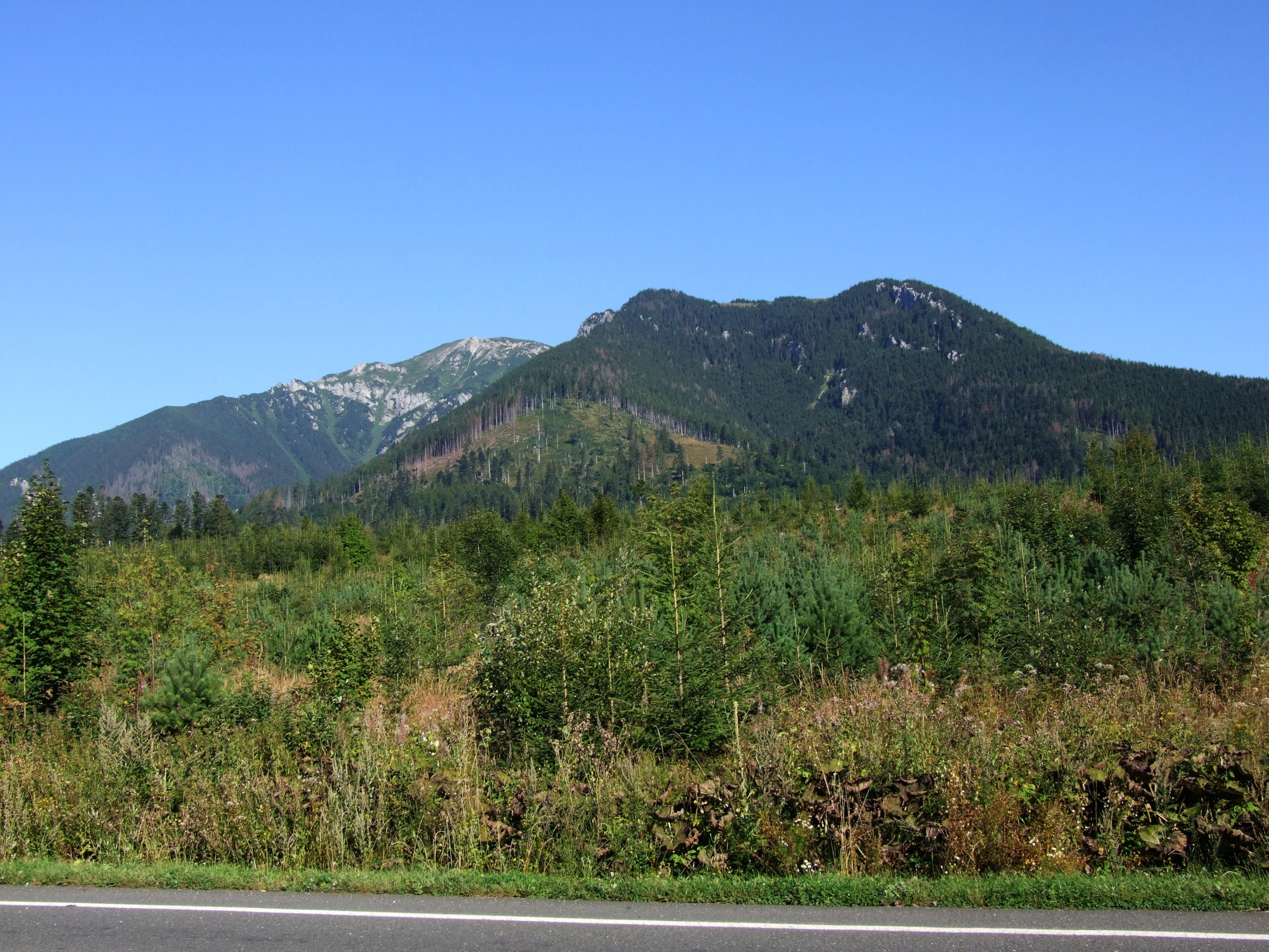 Fajksowa Czuba. Widok z drogi Wolności